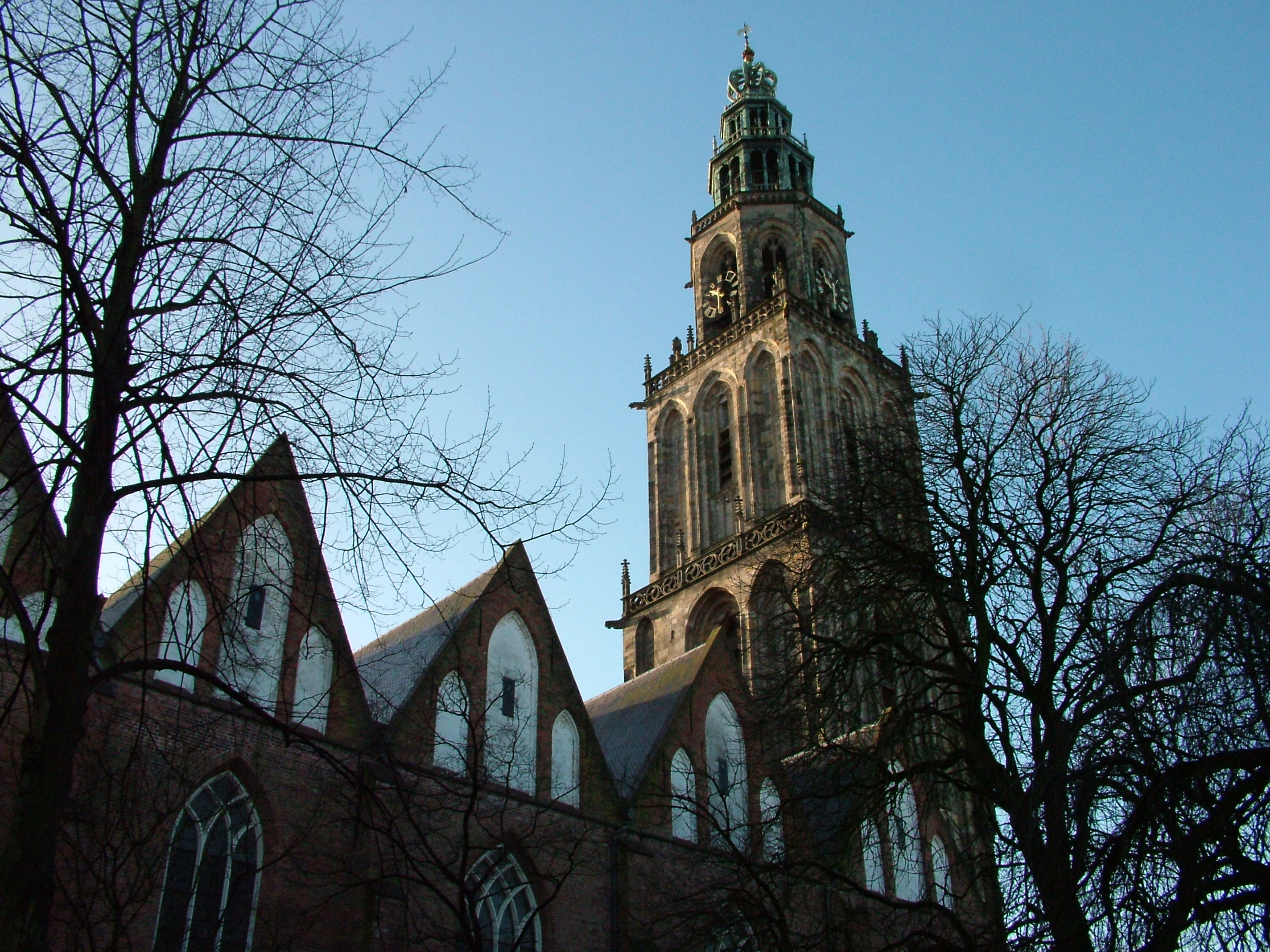 Martinitoren Groningen